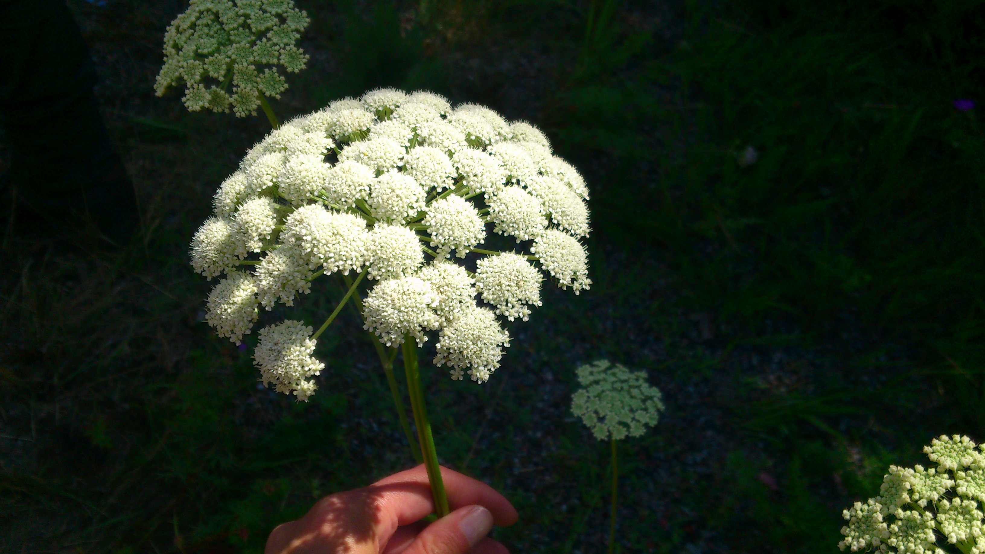 Fotot är taget i Södermanlands län, i närheten av Trosa